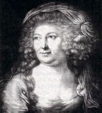 Portrait of Frederika Louisa of Hesse-Darmstadt (1751-1805)